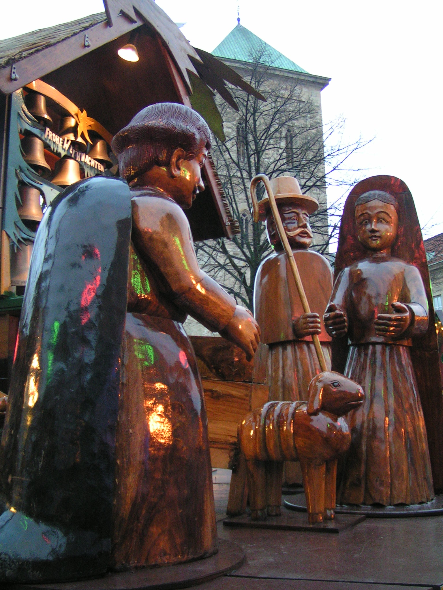 Weihnachtsmarkt Osnabrück: Größte Weihnachtsspieldose der Welt